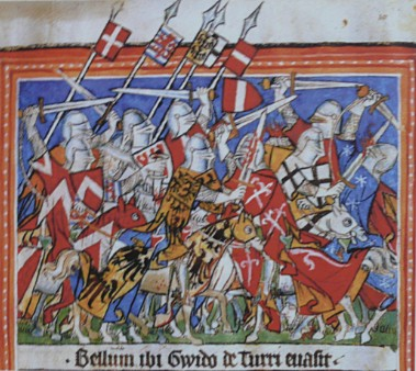 Povstání v Miláně